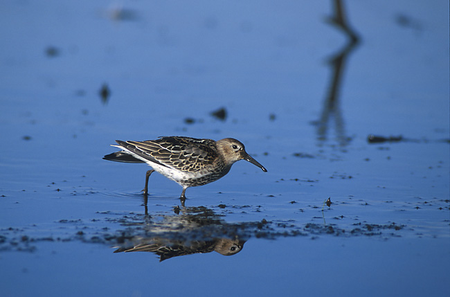 Calidris alpina, Poland